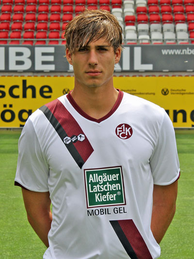 Kevin Trapp, Fußballtorhüter